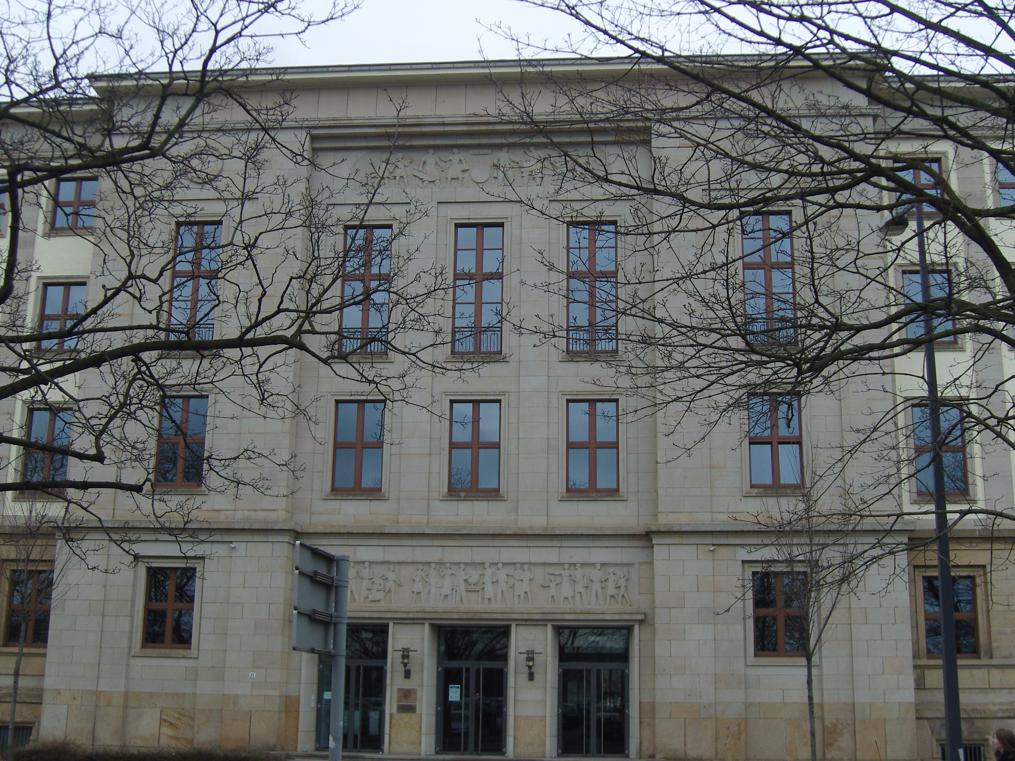 Das Sächsische Staatsministerium für Wissenschaft und Kultur in Dresden. Im Mittelrisalit befinden sich Reliefs von Rudolf Löhner: Direkt unter dem Hauptgesims das Relief Aufbruch in eine neue Zeit, über dem Eingang das Relief Lehrende und Lernende, beide aus dem Jahr 1952.